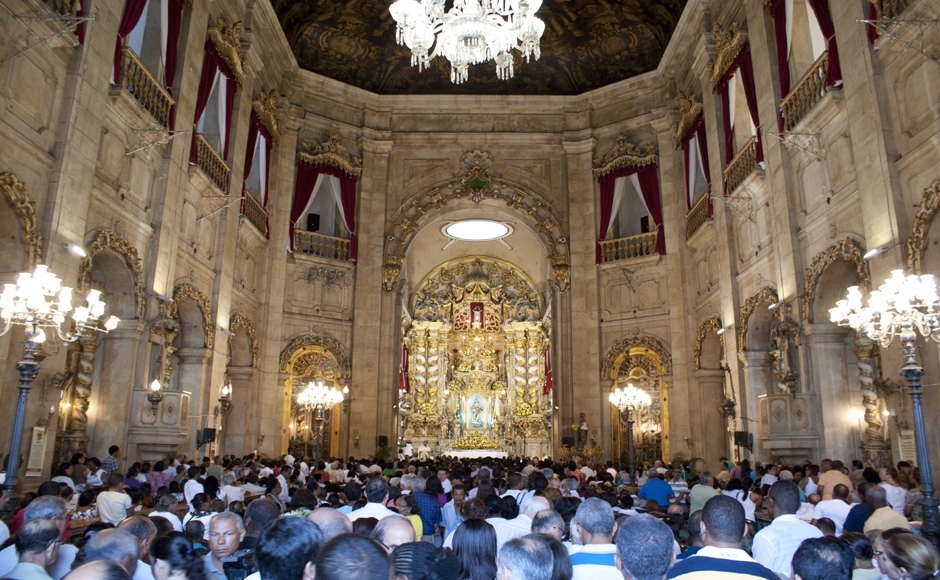 Interior da Basílica de Conceição da Praia, feita em Lioz, na Cidade Baixa, em Salvador da Bahia.